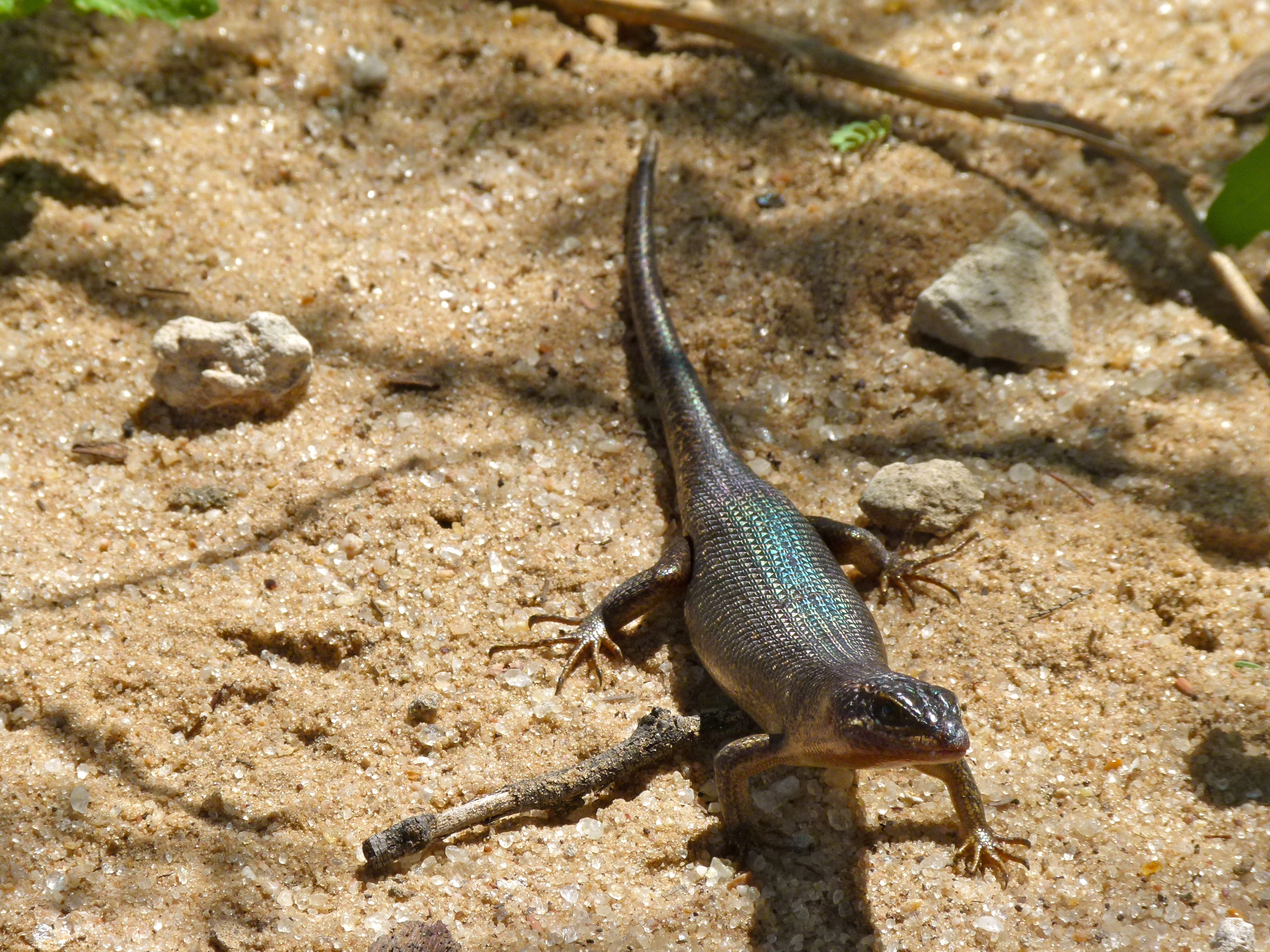 Lijersdraal Picnic Site, Kgalagadi Transfrontier Park, SOUTH AFRICA